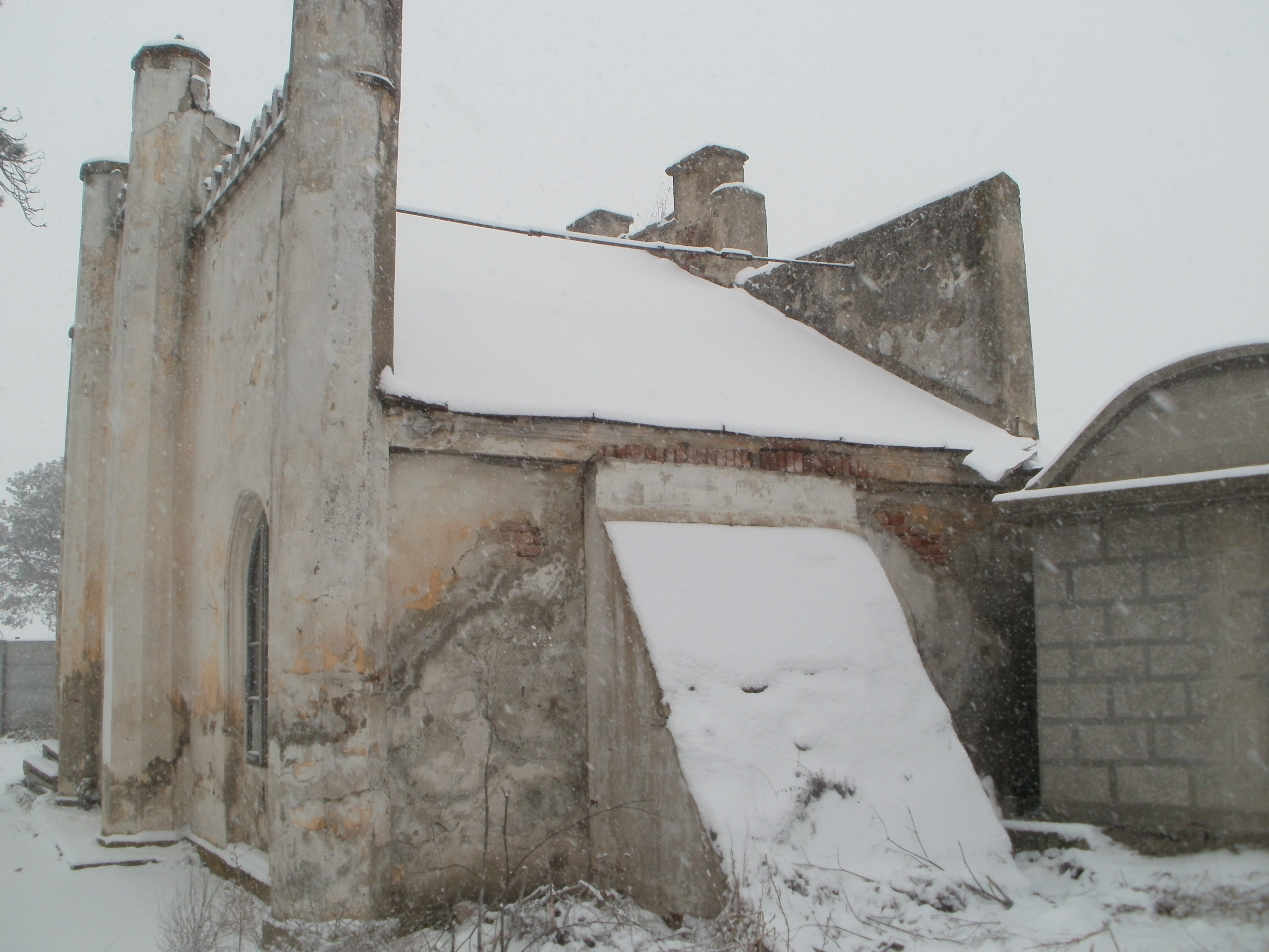 Casa-anexă 02